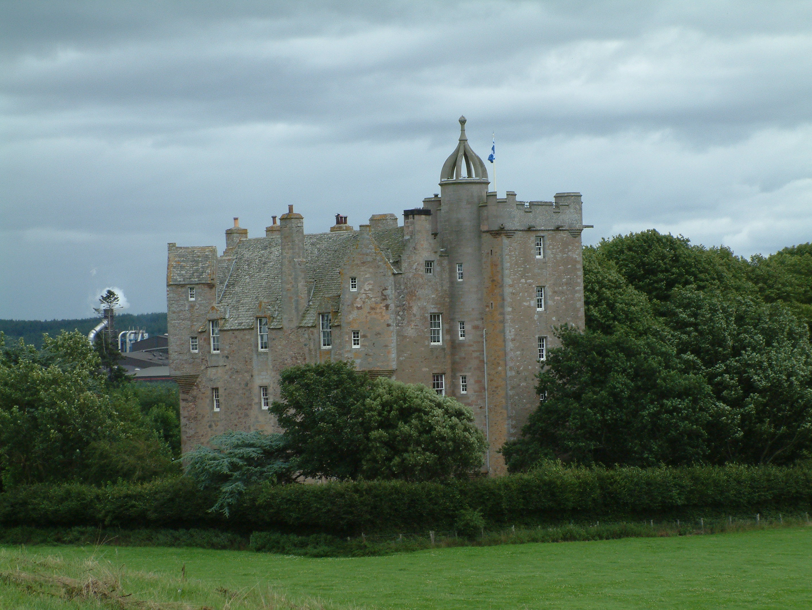 Stuart Castle, Scotland. Zámek Stuart ve Skotsku.